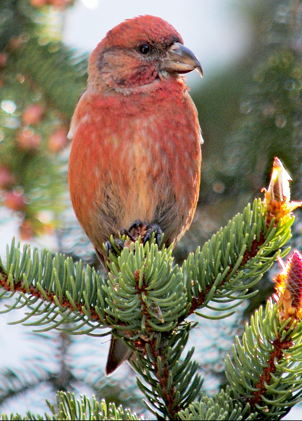 Bec-croisé des sapins Loxia curvirostra